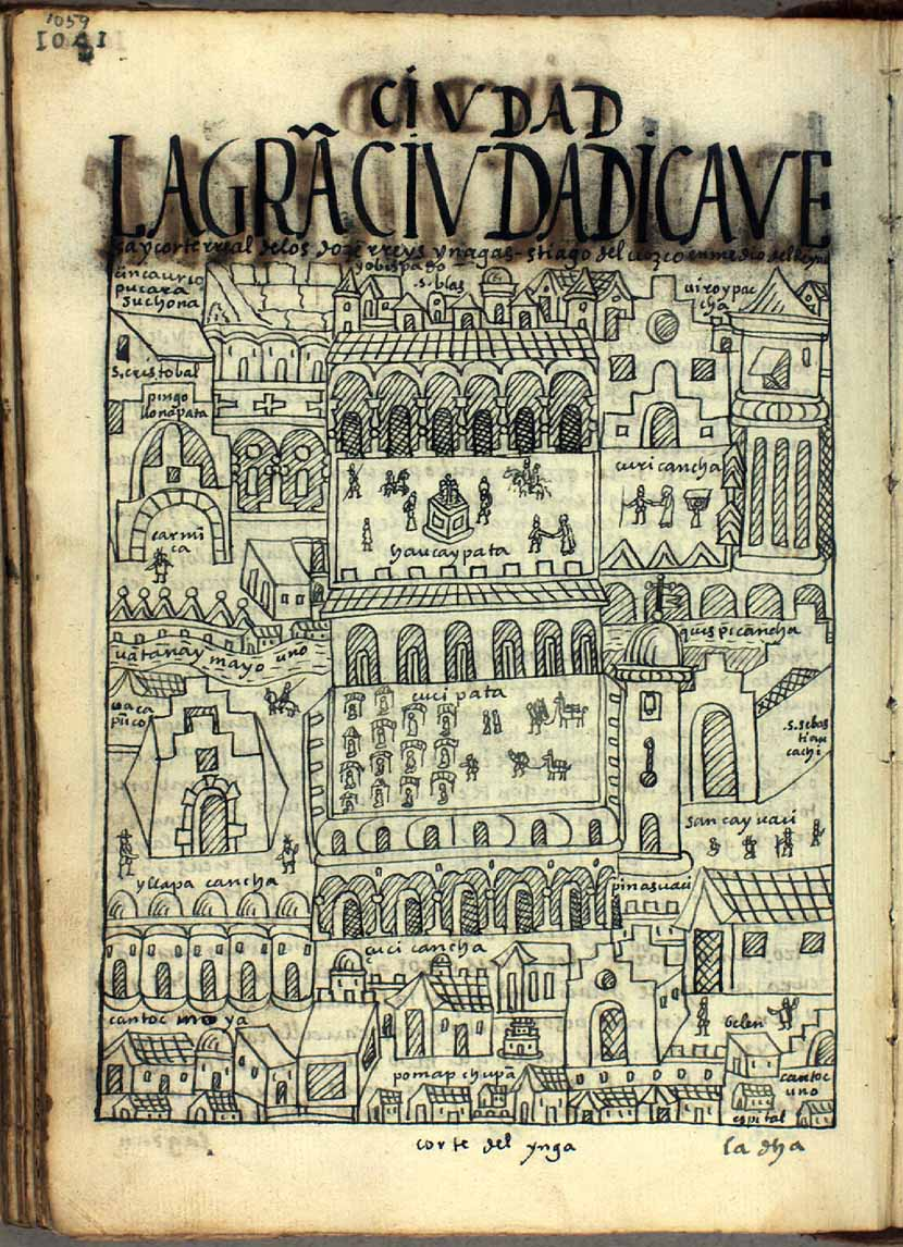 Vista del Cuzco según Guaman Poma